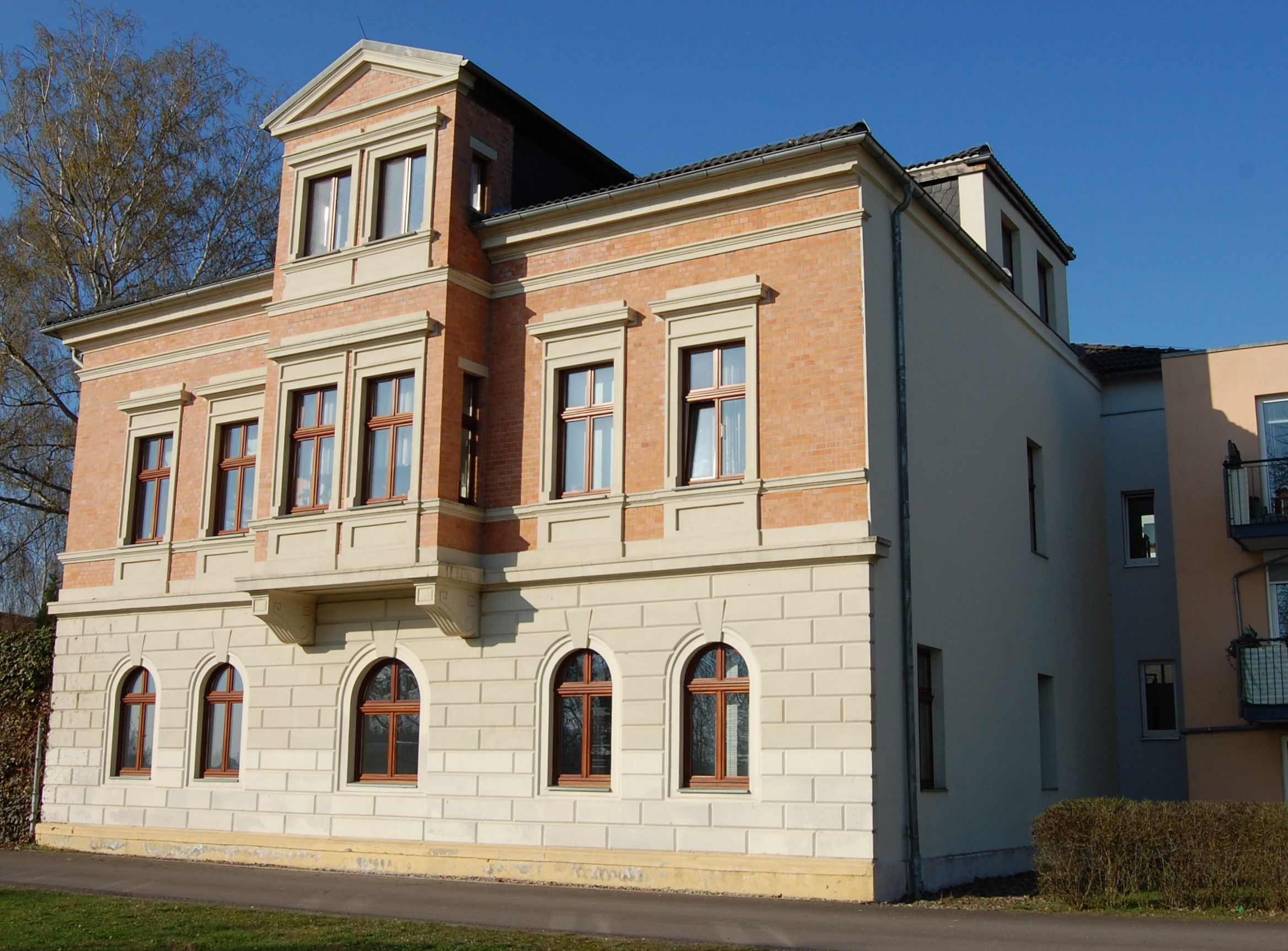 Gerloffsche Villa in Westerhüsen, Blick von Nordosten